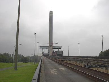 Hellend vlak van Ronquieres